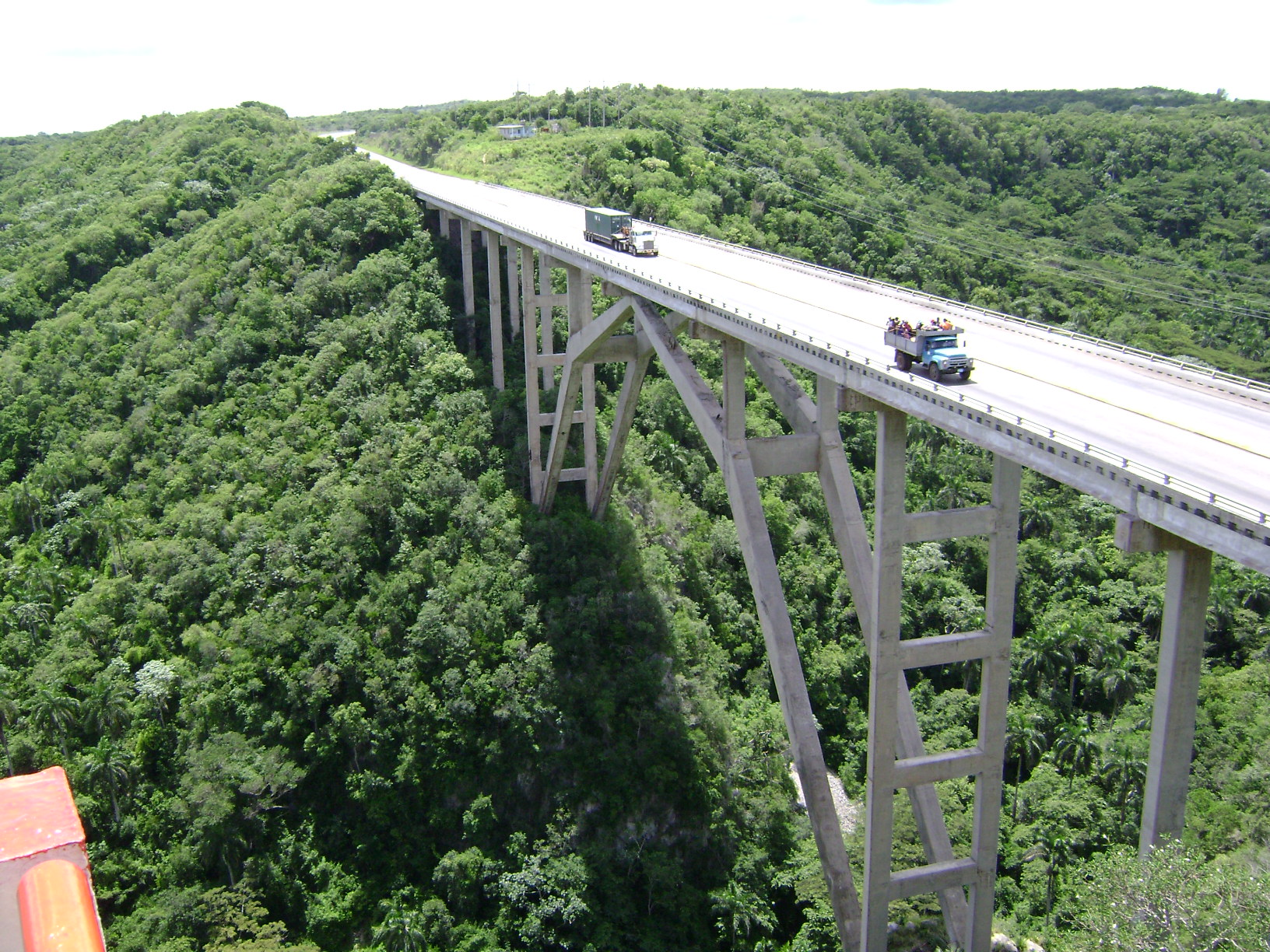 Puente de bacunayagua en la frontera Habana-Matanzas